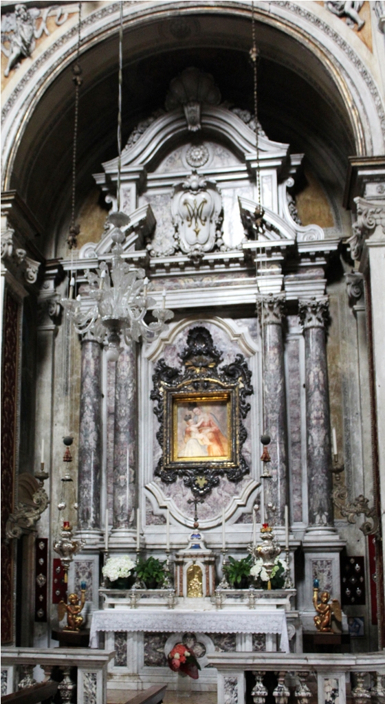 Madonna del Camino - Chiesa di S. Maria in Calchera - Brescia